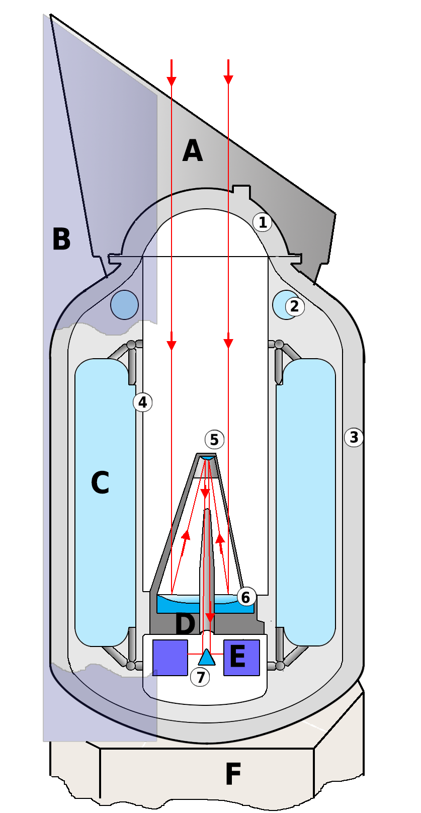 Schéma des principaux composants du télescope spatial infrarouge ISO (Infrared Space Observatory) de l'Agence spatiale européenne (vue en coupe) : A Pare-soleil ; B Panneaux solaires ; C Réservoir torique d'hélium liquide (2300 litres) ; D Télescope ; E Instruments scientifiques ; F Plateforme ; 1 Couvercle amovible ; 2 Réservoir d'hélium liquide (60 l.) 3 Isolants ; 4 Tube optique ; 5 Miroir secondaire ; 6 Miroir primaire ; 7 Miroir tertiaire pyramidal.